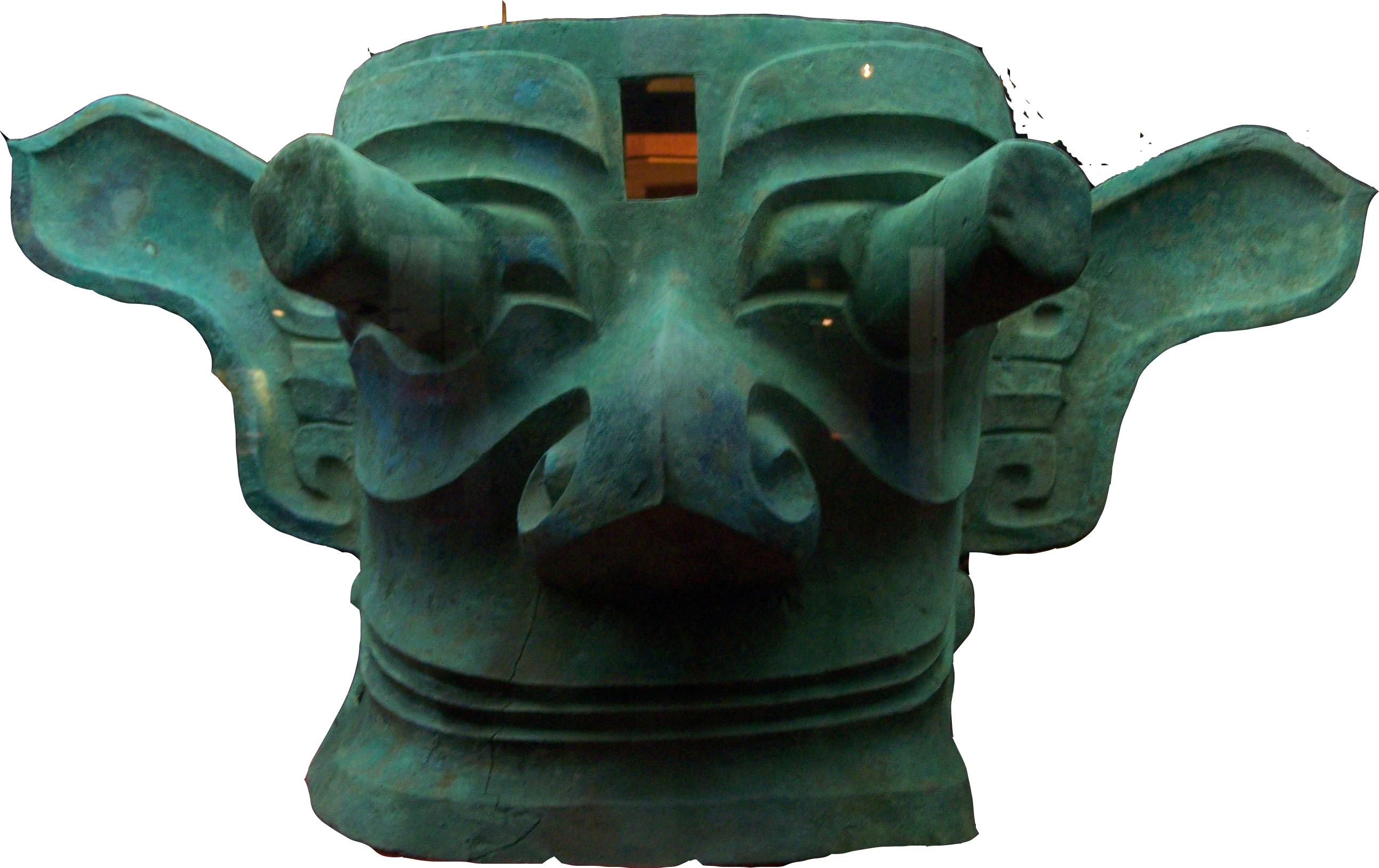 QingTong ZongMuMianJu of SanXingDui